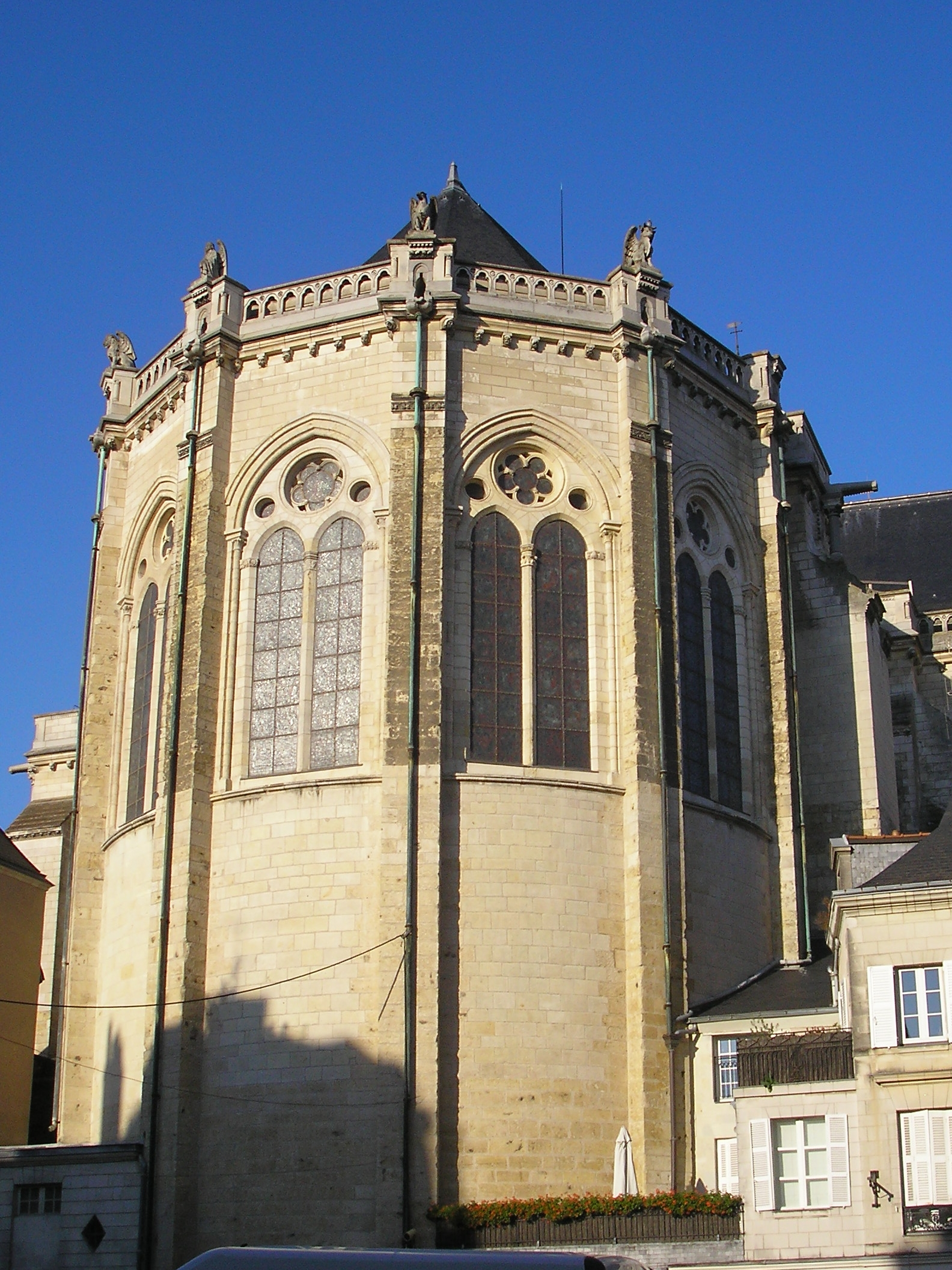 Angers (Pays-de-Loire, France). Chevet de la cathédrale Saint-Maurice.